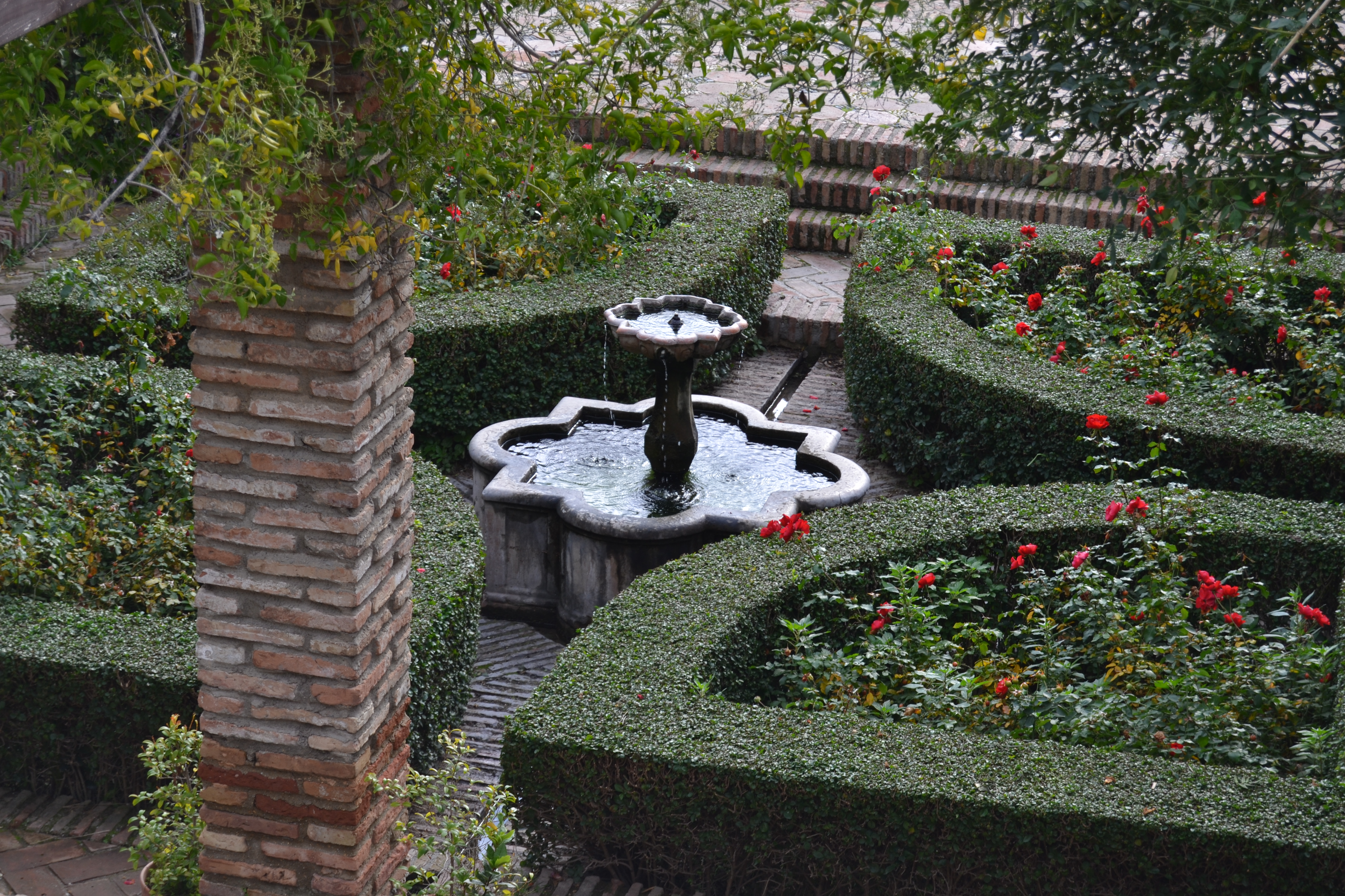 Fuente en la Alcazaba de Málaga, España.